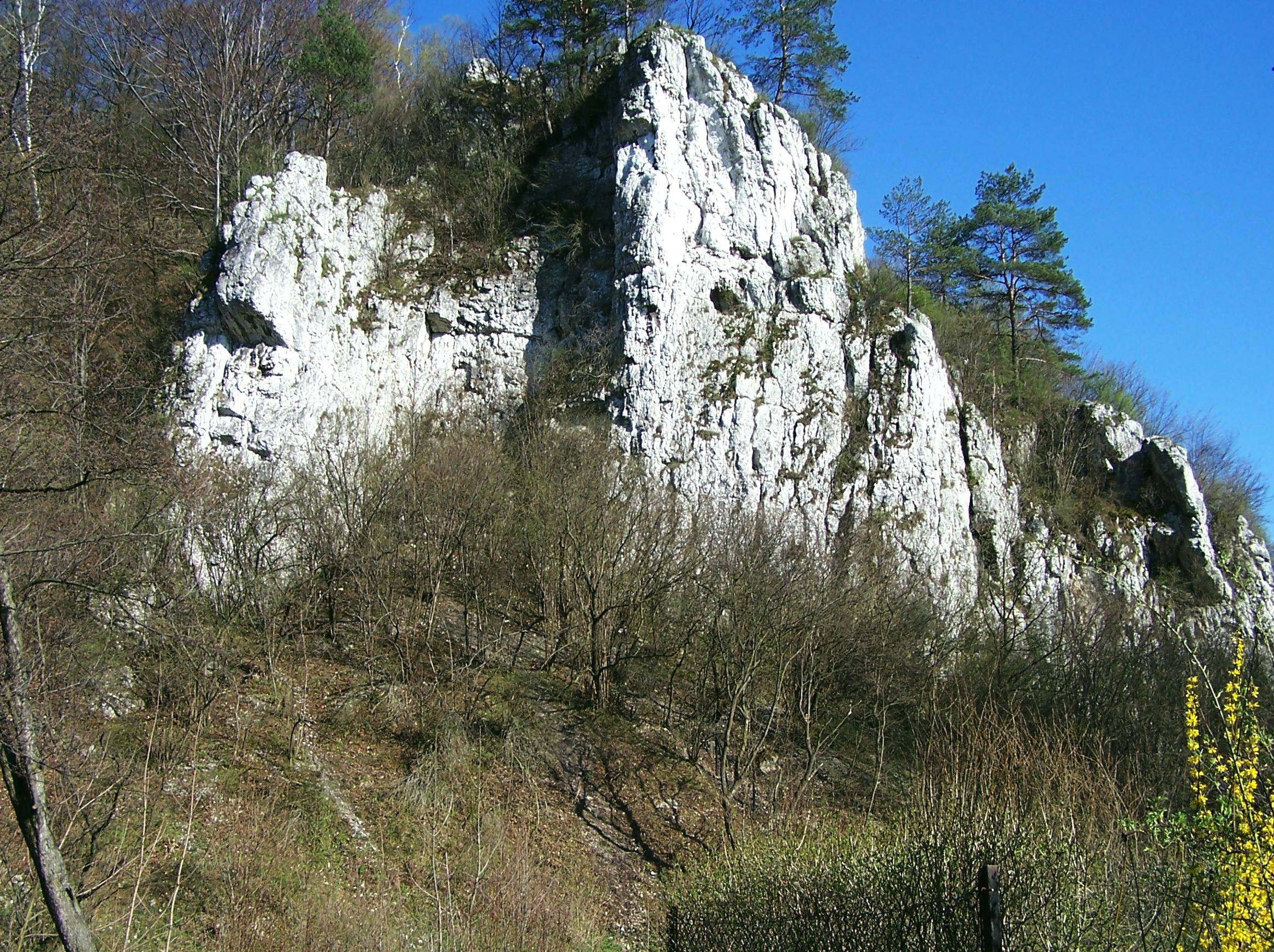 Dolina Kluczwody (Dolinki Krakowskie)